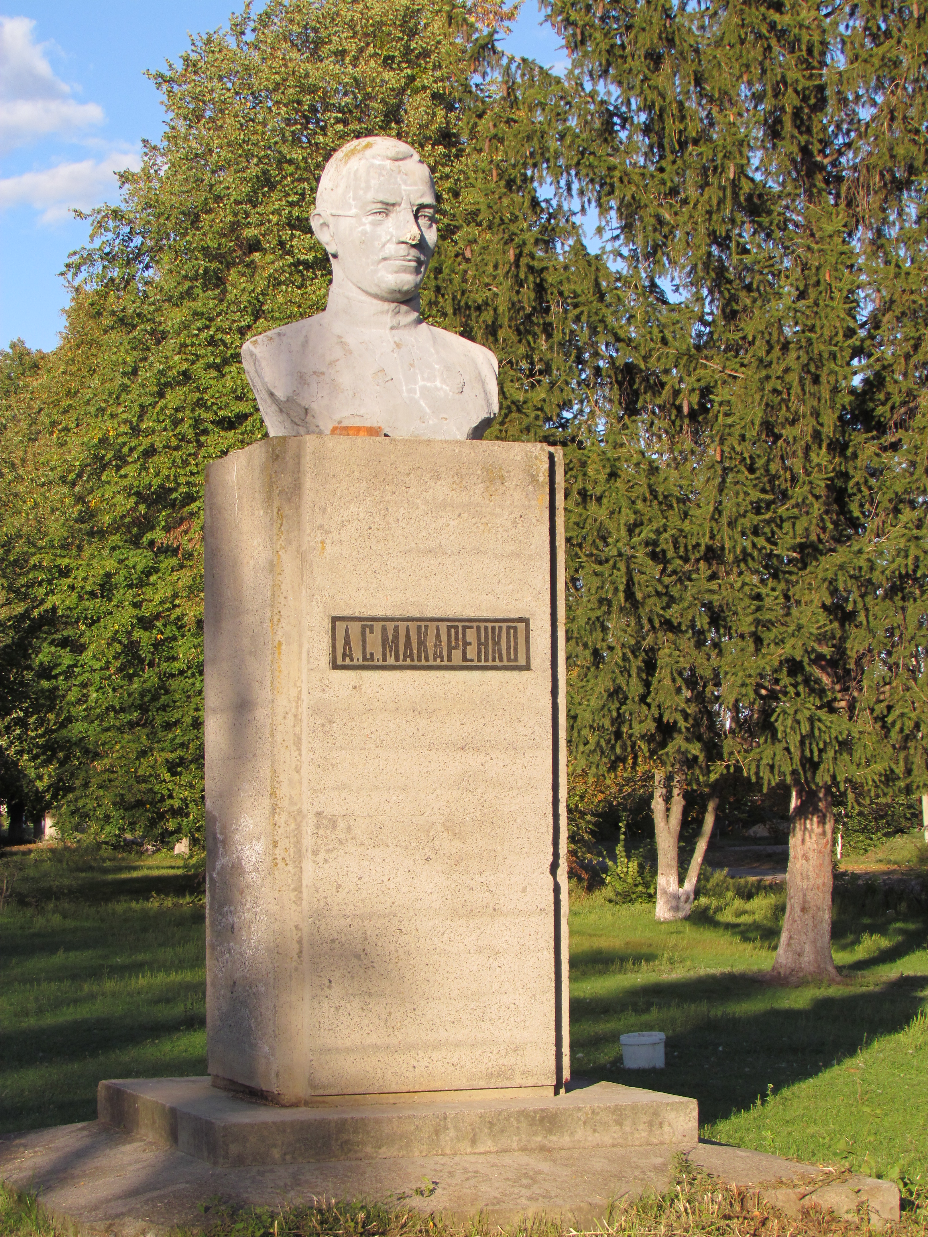 Полтавська область , с.Ковалівка, Пам'ятник-бюст А. С. Макаренку